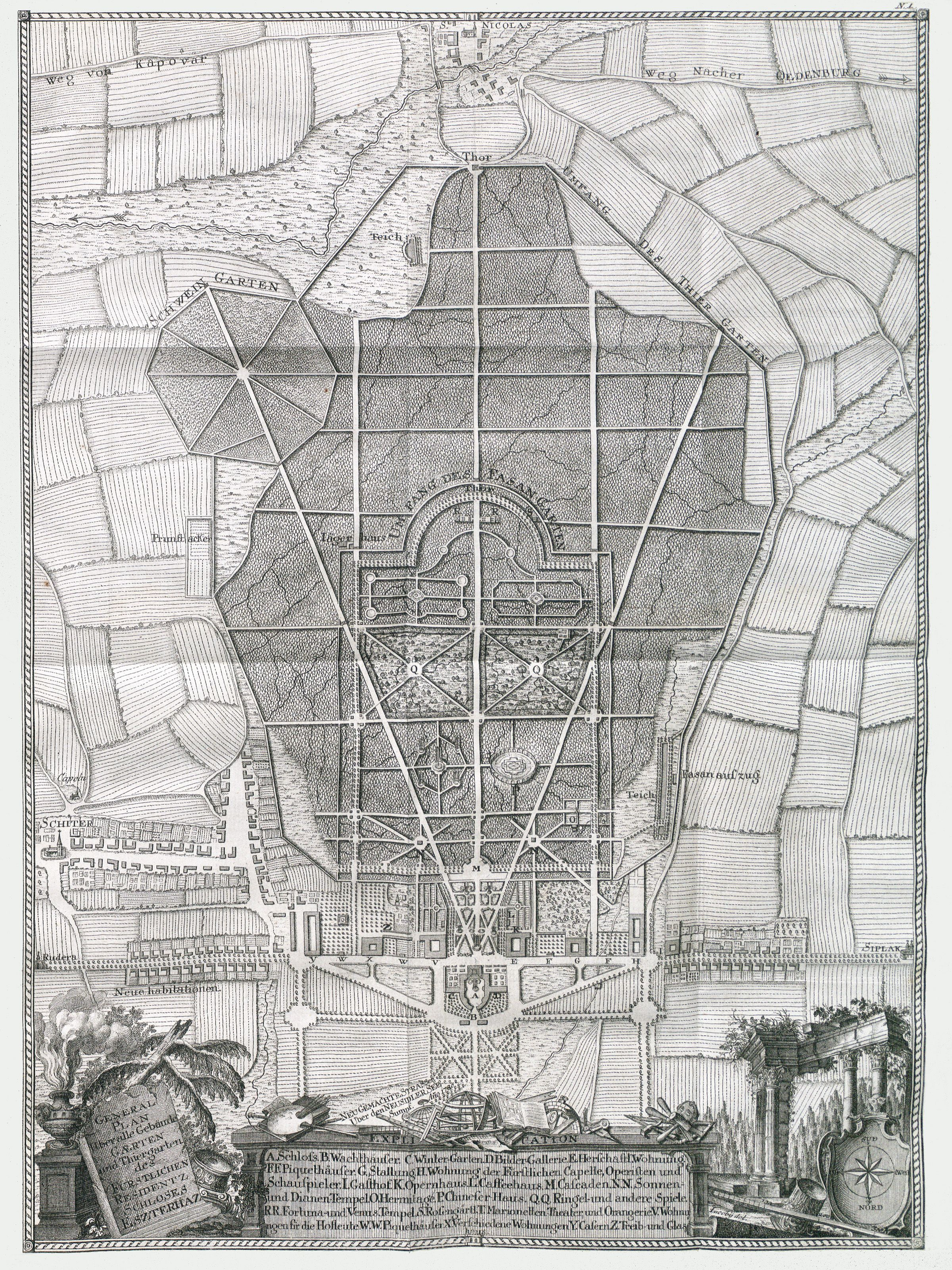 Gesamtplan von Schloss und Park Esterháza 1784